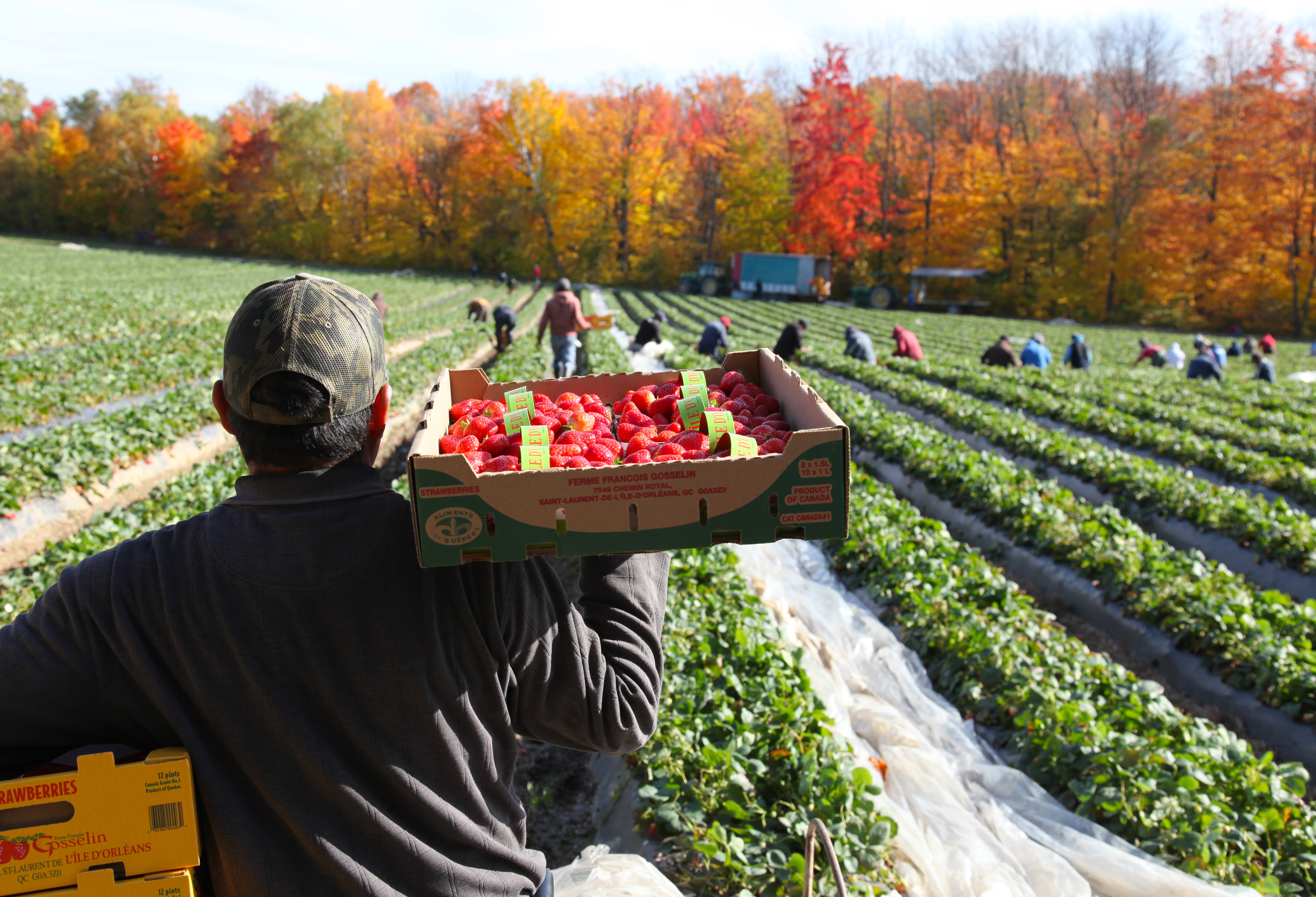 Erntehelfer auf einem Erdbeerfeld auf einer Plantage, Erdbeeren-Ernte einer späten Sorte im Oktober, Île-d'Orléans in Quebec, Kanada